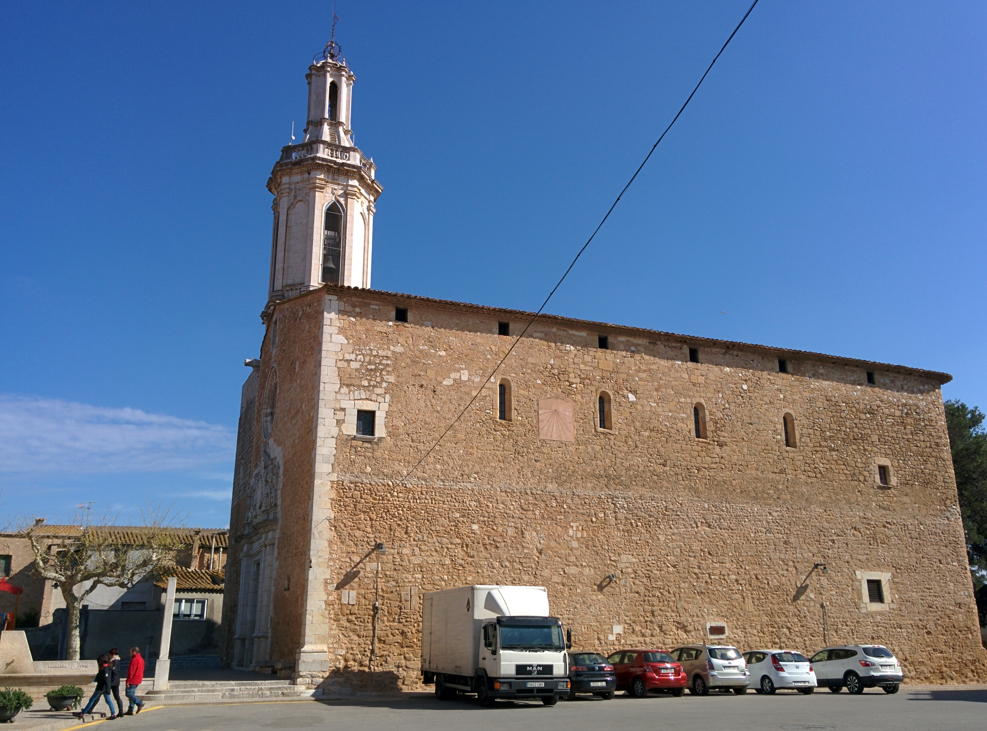 Església de Sant Andreu de Borrassà (Borrassà)